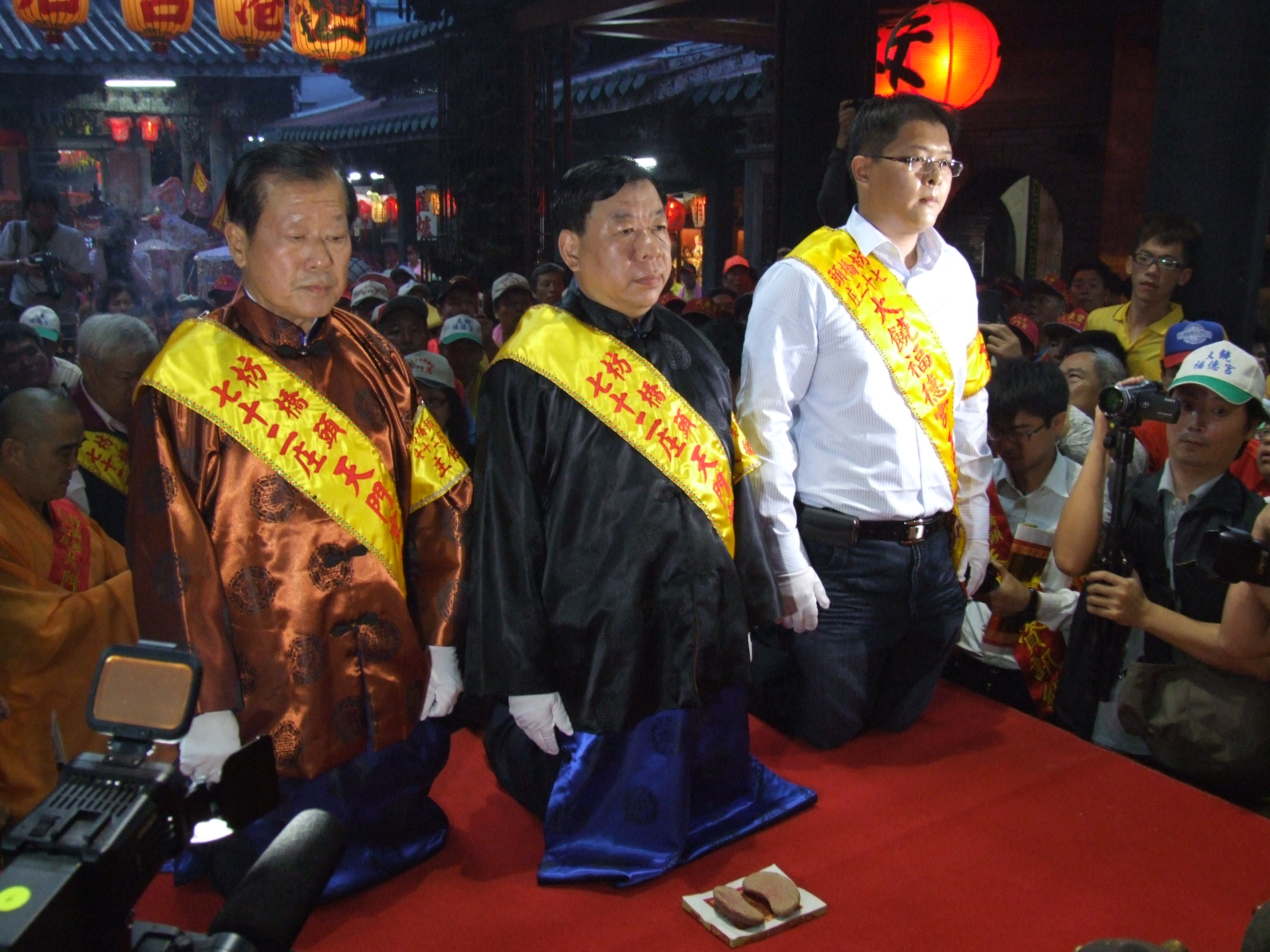 社頭枋橋頭七十二庄迓媽祖跪供桌交香